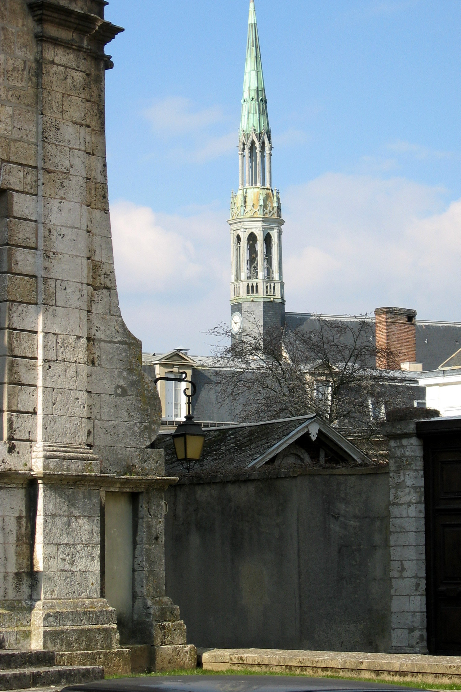 Rue Saint-Jacques, tribunal et chapelle des Sœurs de Saint-Paul, Chartres, Eure-et-Loir (France).